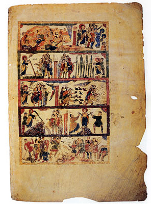 Ilustración de una página de la Biblia del monasterio de Ripoll. Biblioteca Vaticana